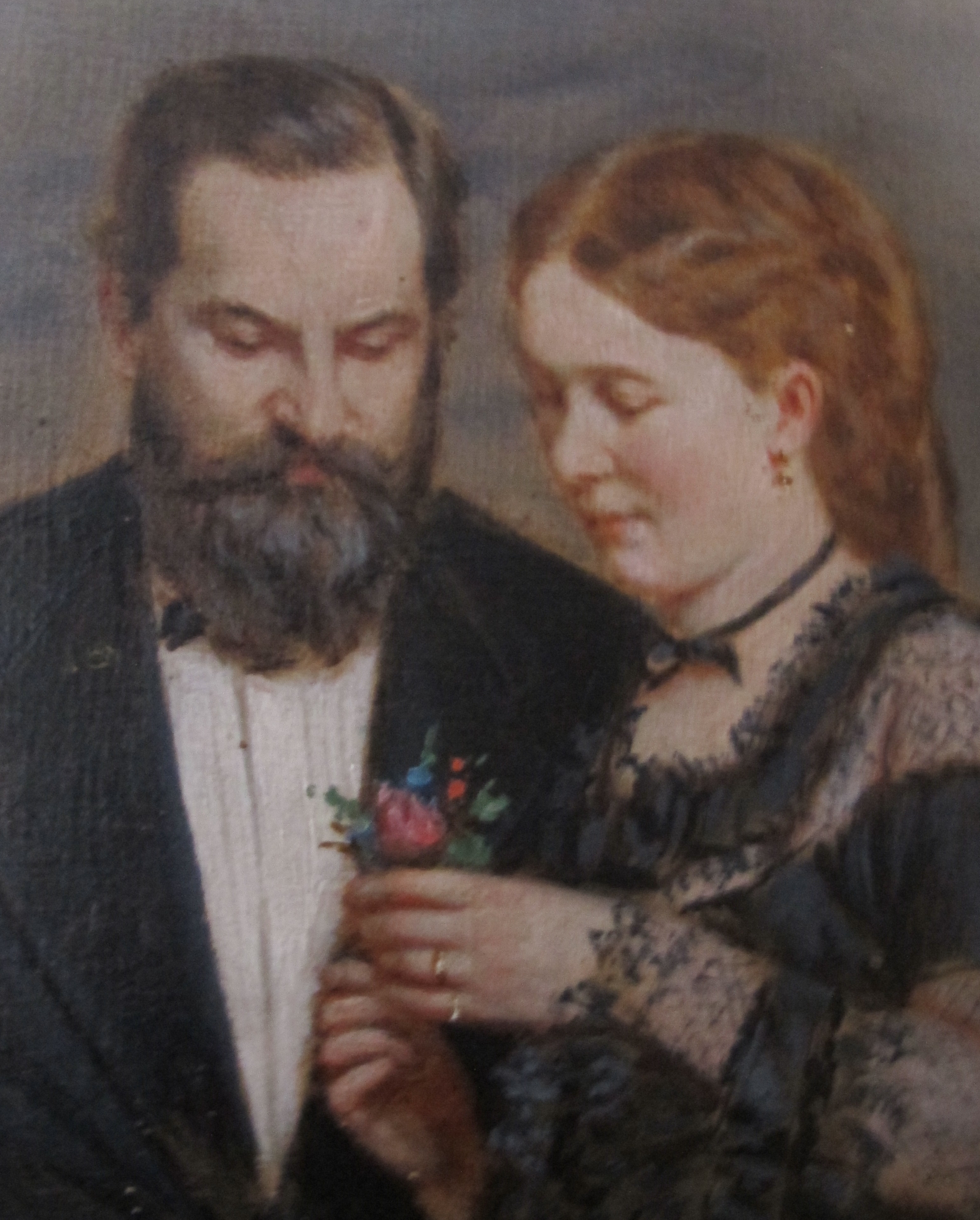 Tabloul strabunicilor mei Ioan V. Socec si Marie Socec in 1870.